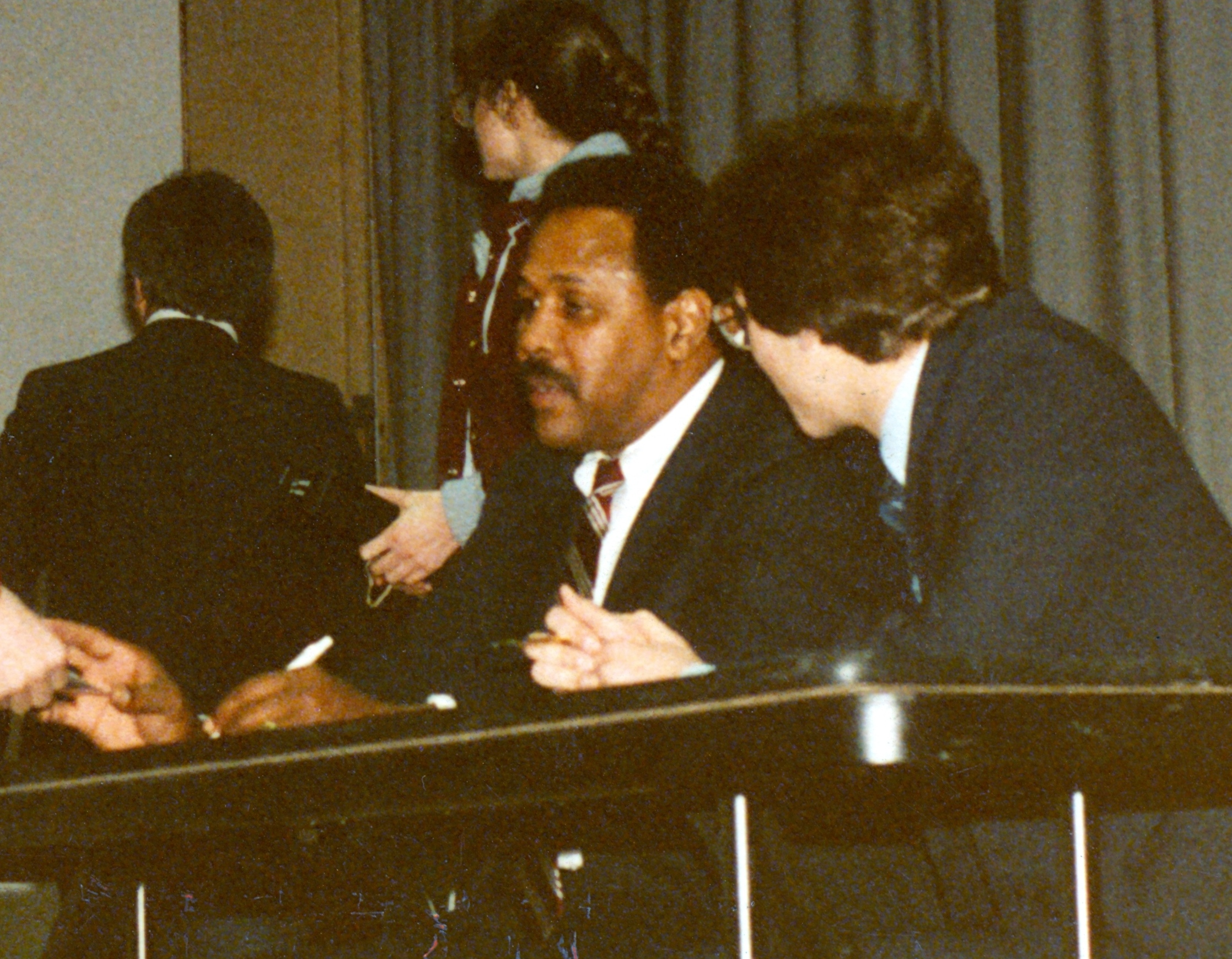 Me and Willie Stargell